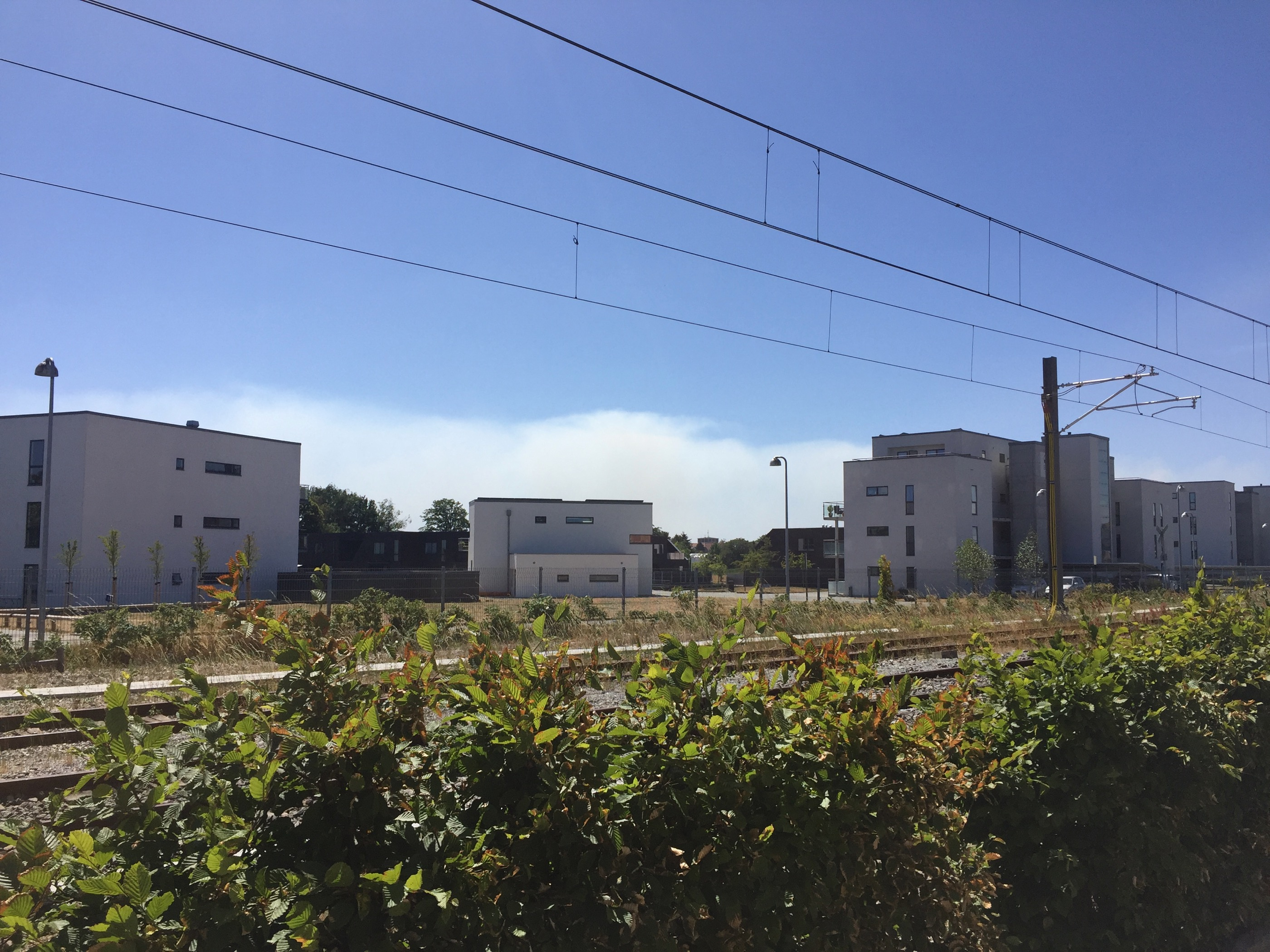 Åbyen er en bydel under opførelse. Her set nord for jernbanen.